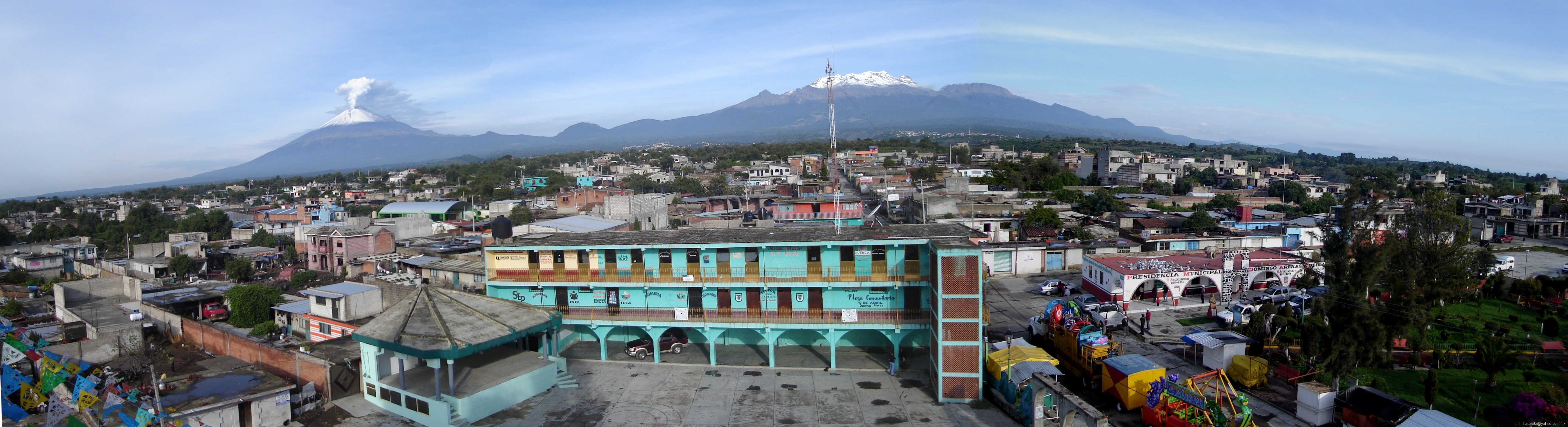 Panorámica de la cabecera del municipio Domingo Arenas en el estado de Puebla, tomada desde la torre norte del templo de Santiago Xaltepetlapa, el 28 de julio de 2011.